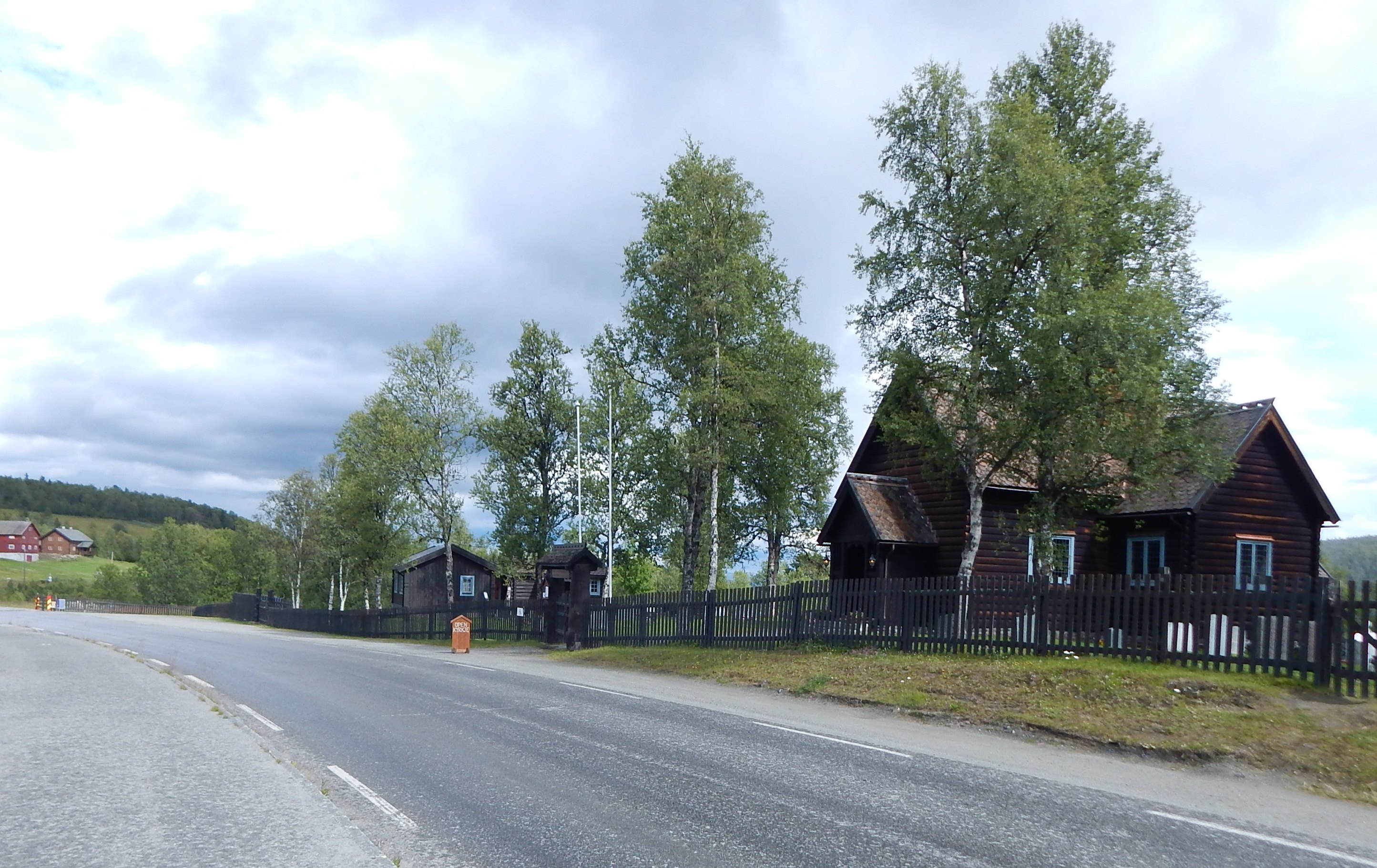 Fylkesvei 425 forbi Skåbu kirke